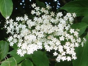 Elderflowers